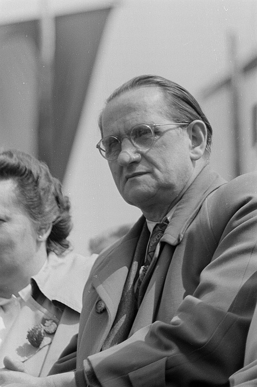 Original image description from the Deutsche Fotothek Porträt des Leipziger Oberbürgermeisters Max Ernst Opitz